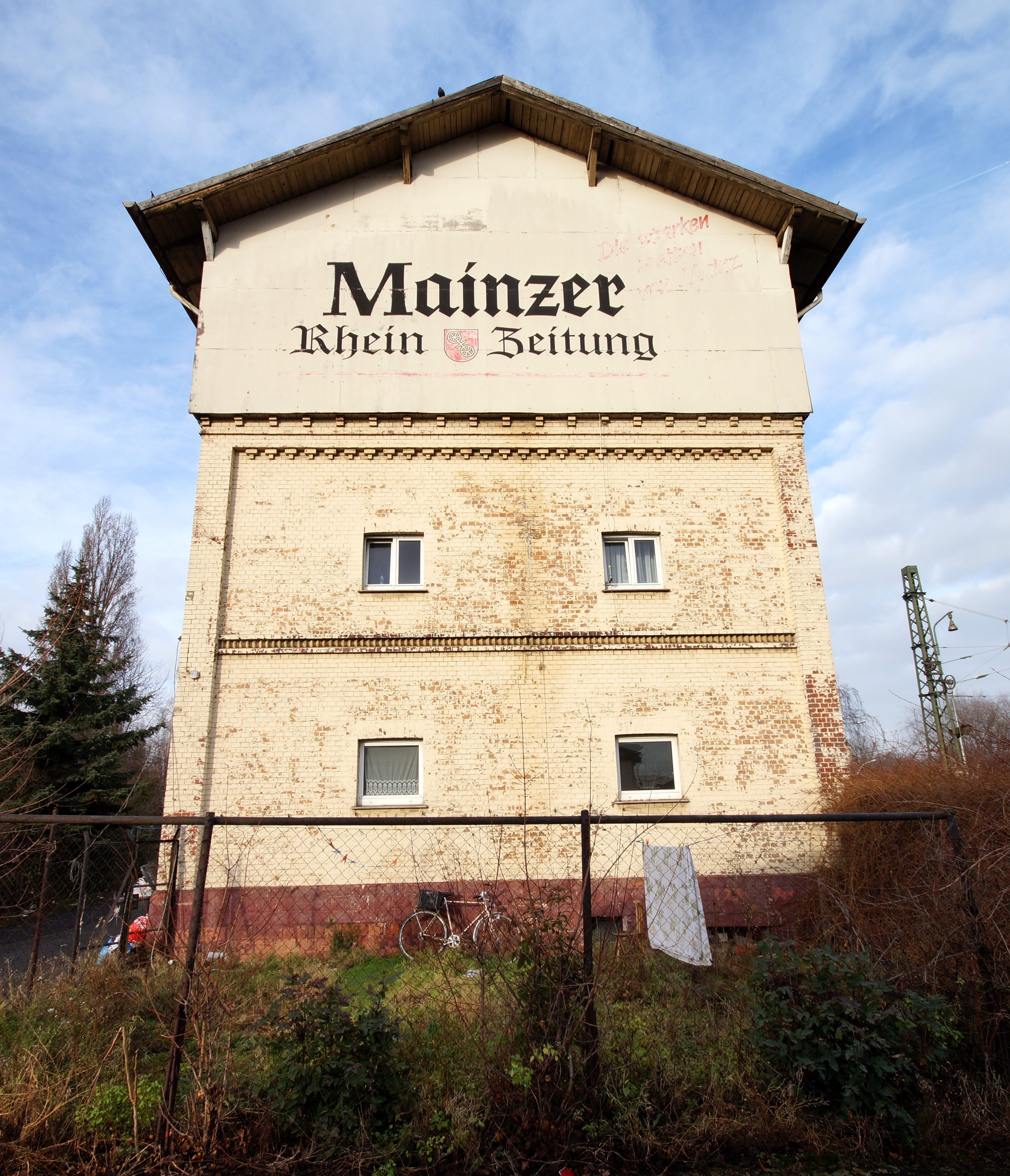 Ein Wohnhaus in der Nähe des Bahnhofs Mainz-Kastel westlich der Taunus-Eisenbahn mit Werbung für die Mainzer Rhein-Zeitung